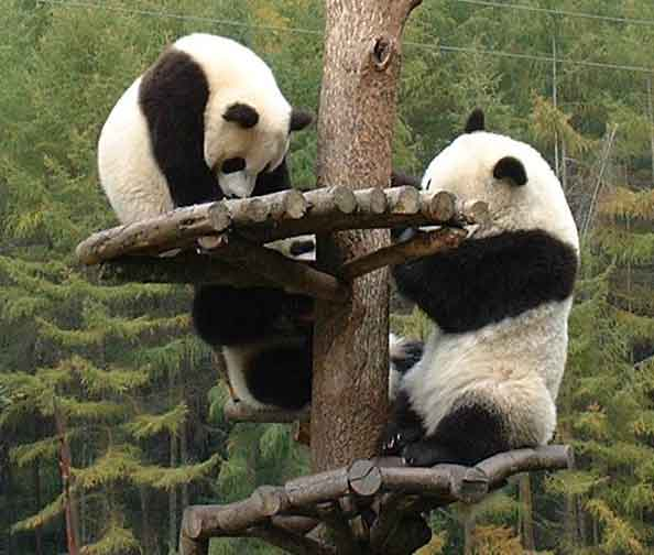 Panda-Bären in Wolong/Sichuan